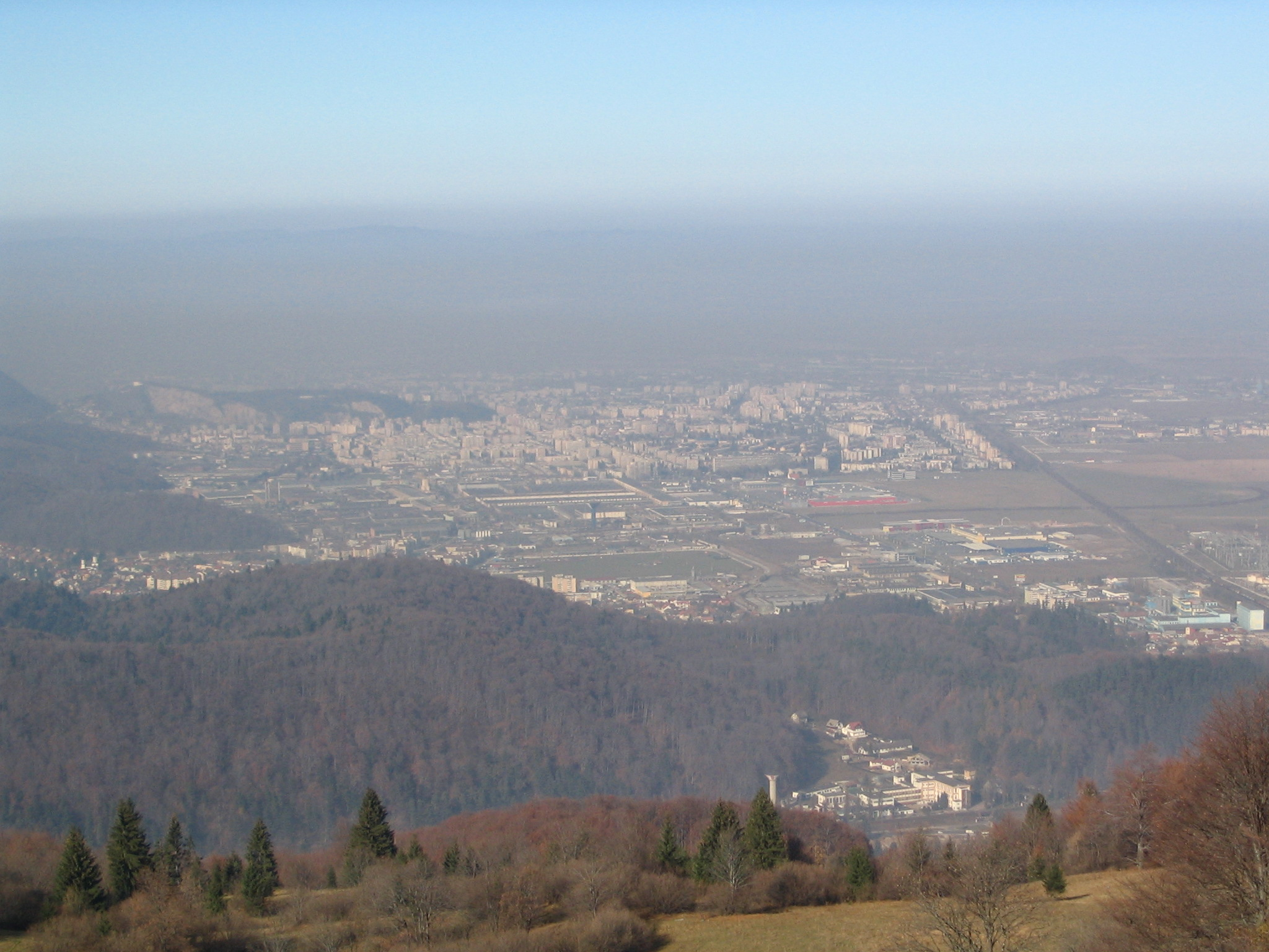 Brassó a Bolnokról